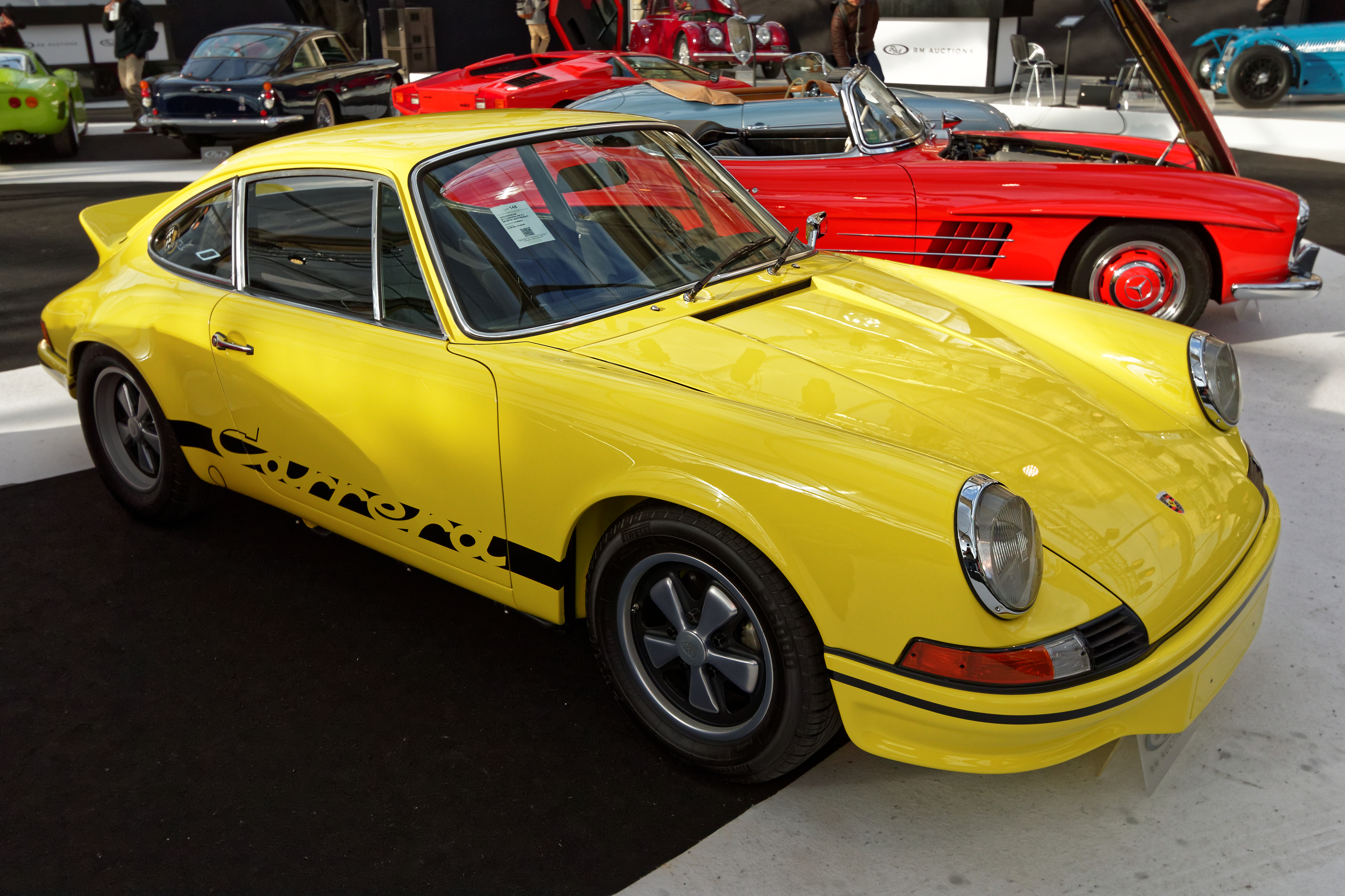 La vente aux enchères RM auctions aux pied des Invalides à Paris le 4 février 2015.